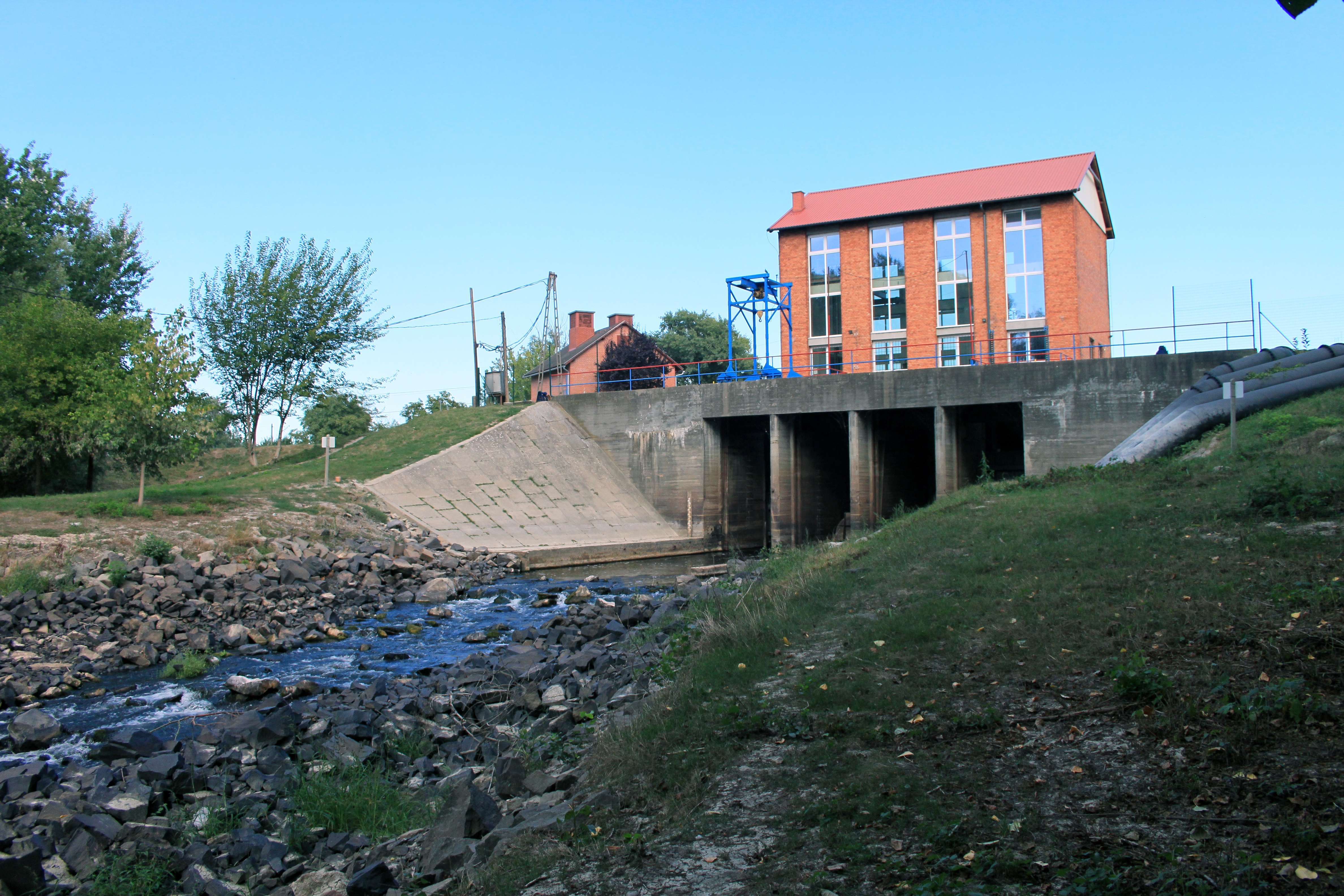 Zsilip a Duna-völgyi-főcsatornán Bajánál